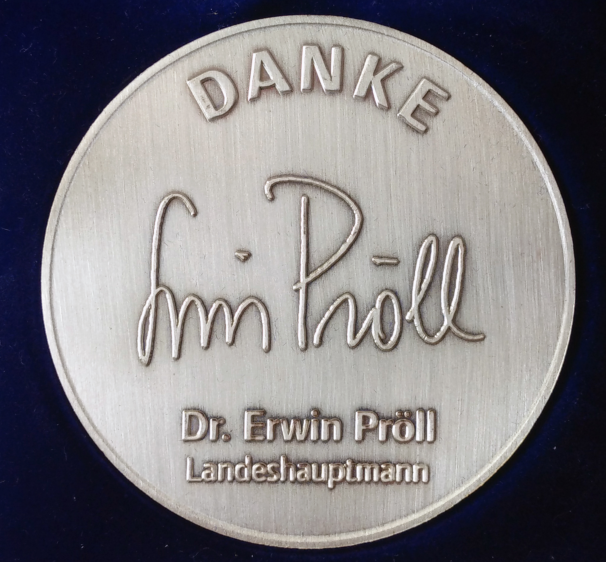 Anerkennungsmedaille des Landes Niederösterreich für Verdienste um die Landesausstellung (2005, Rückseite)